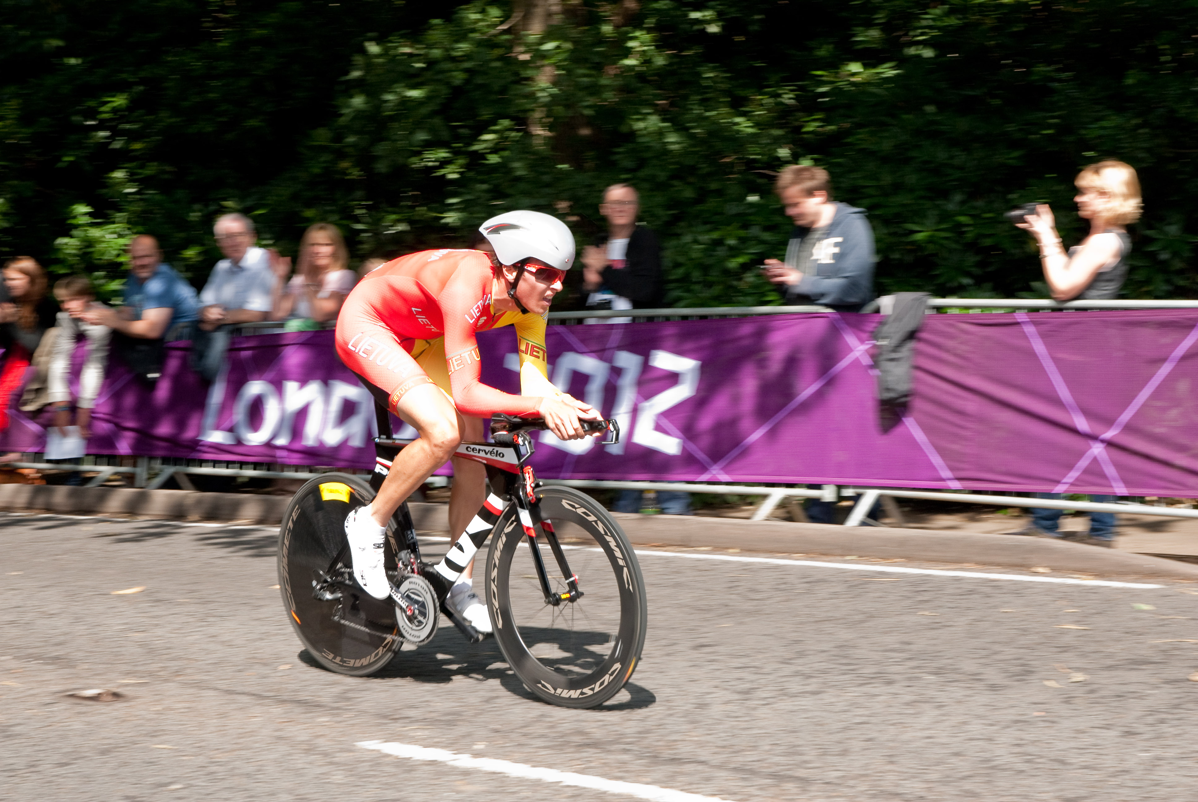 Ramunas Navardauskas - Lithuania